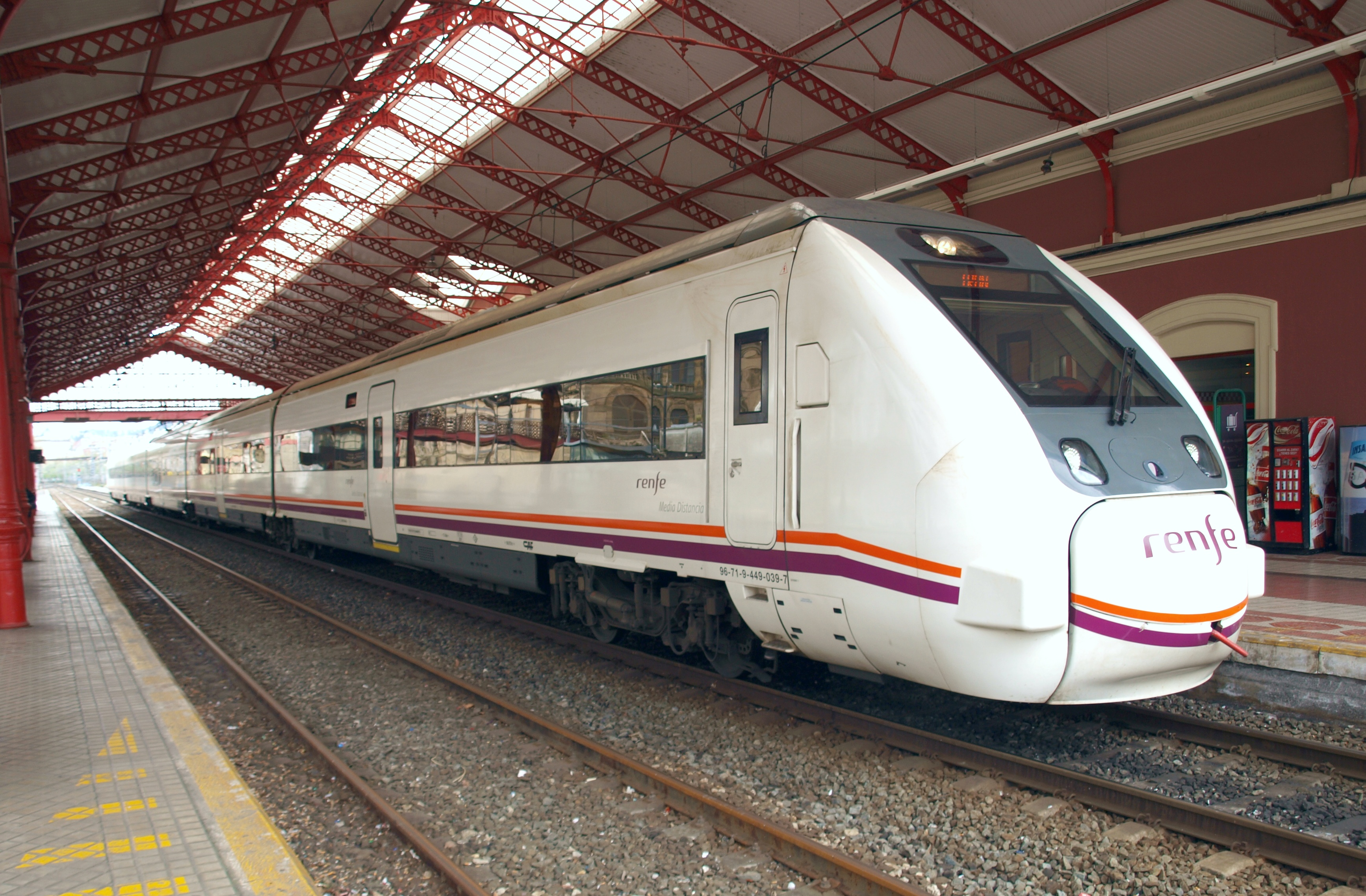 Media Distancia 449-059 en la estación de San Sebastián. Proviene de Barcelona.